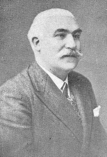 Blas Agra Mancebo, fotografía en Vida Gallega 1933